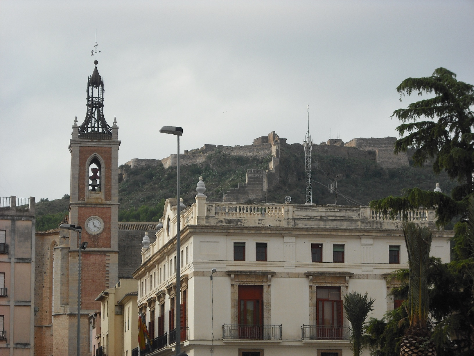 Vista de Sagunt des de la plaça del Cronista Chabret.